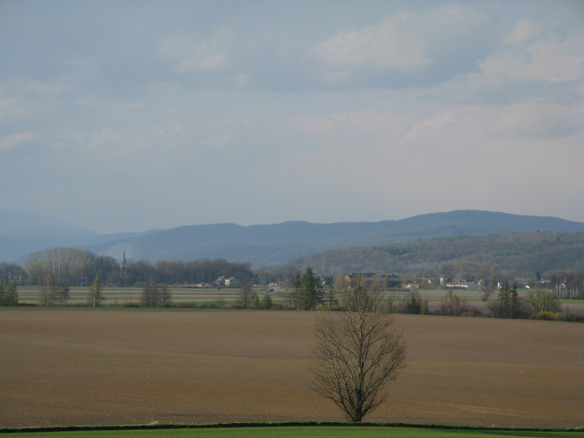 Česky: MB u Moravičan - pohled od Měníka (na obzoru Úsovská vrchovina)